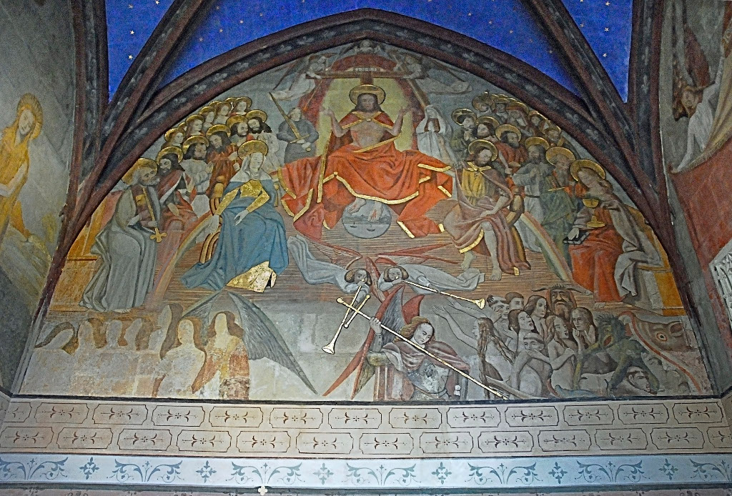 Extrait du cycle de fresques au rez-de-chaussée de la tour sud de Saint-Mexme. Photo Gérard Boullay.